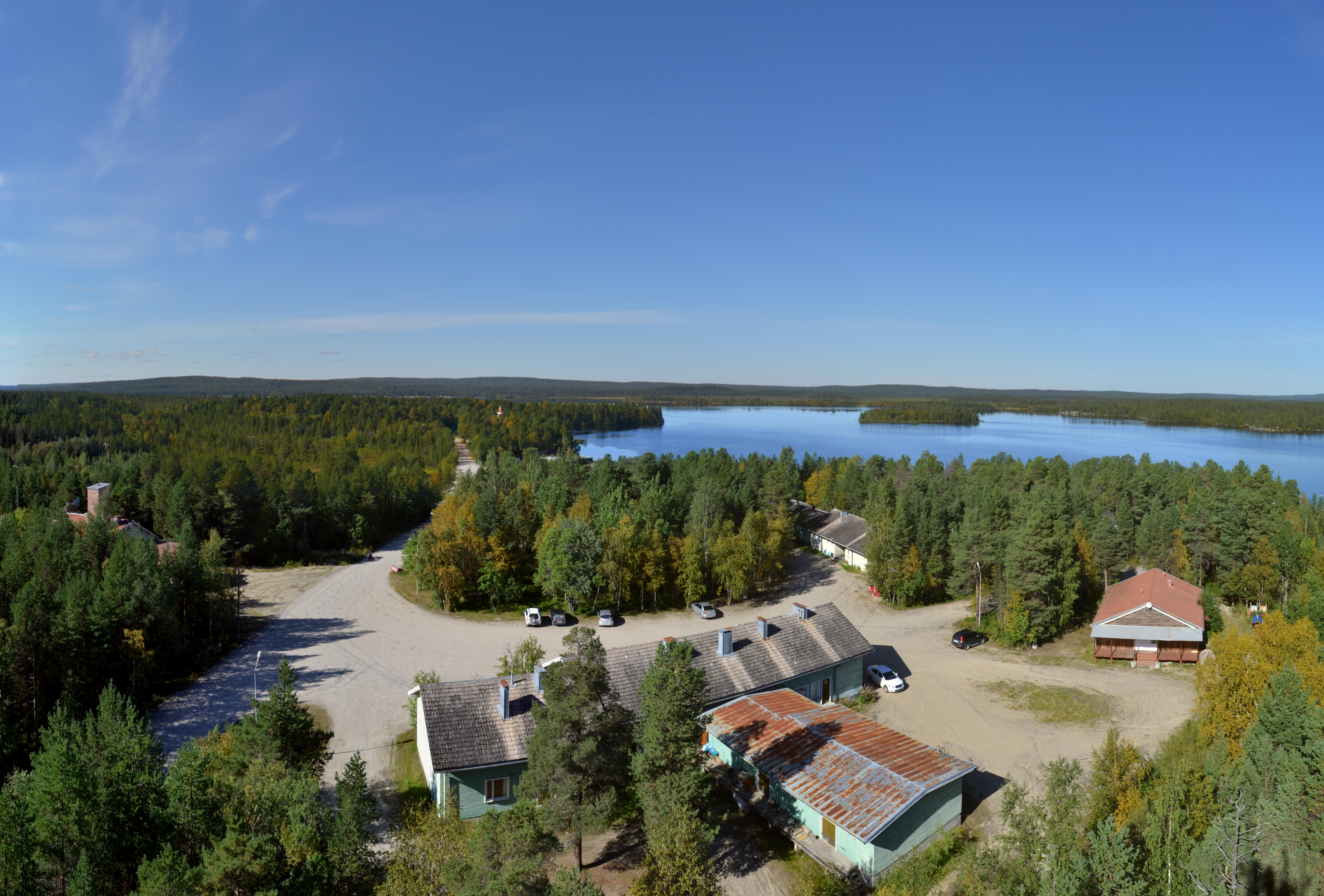 п. Раякоски. Центральная площадь. Август 2016 г.